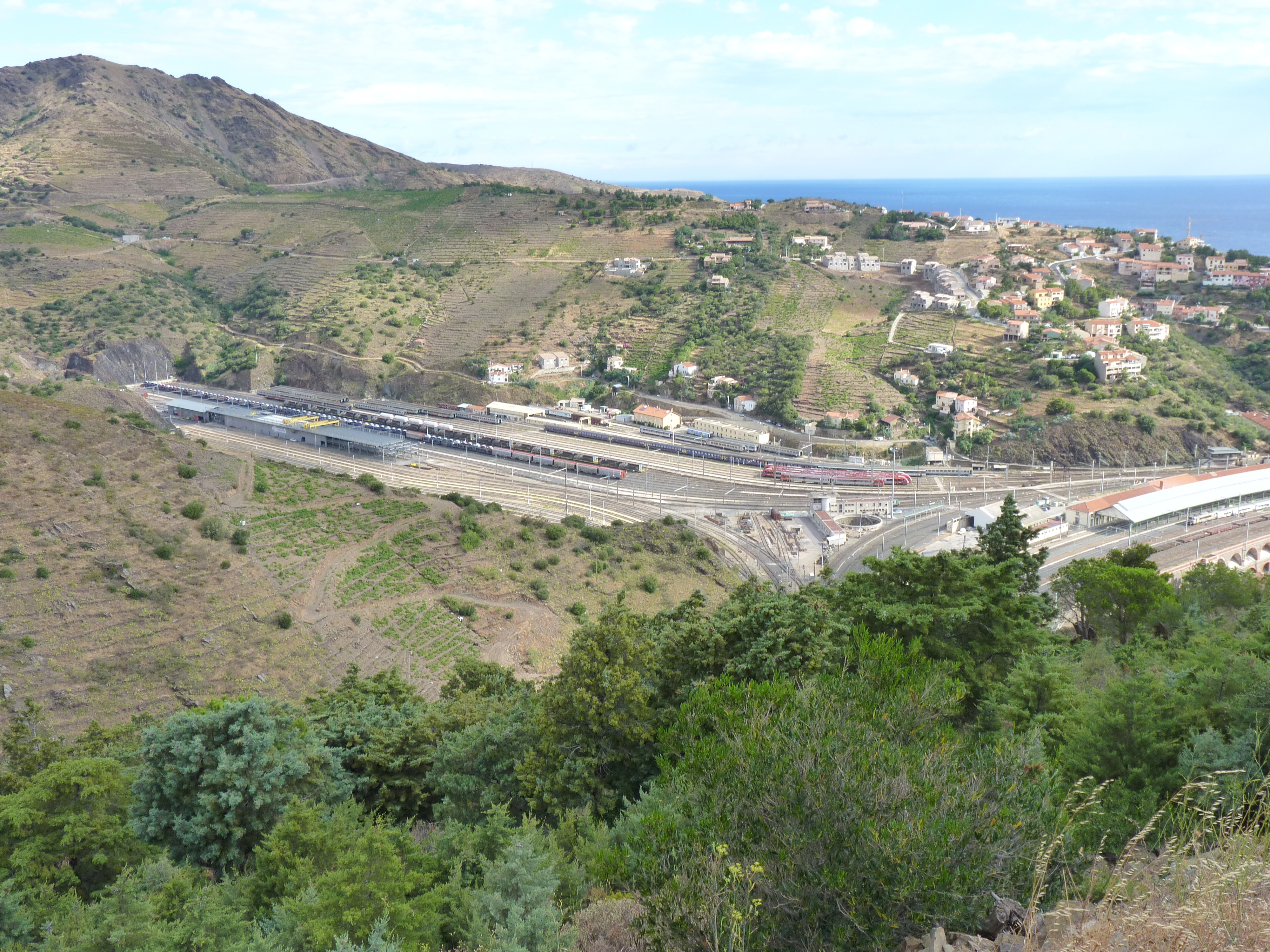 Gare internationale ferroviaire, Cerbère (Pyrénées-Orientales, Languedoc-Roussillon, France)